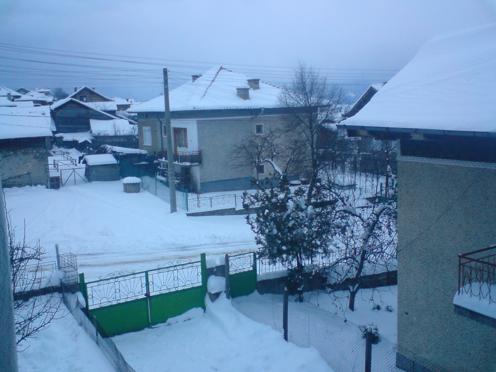 Зимен пейзаж заснет пред джамията в село Дорково